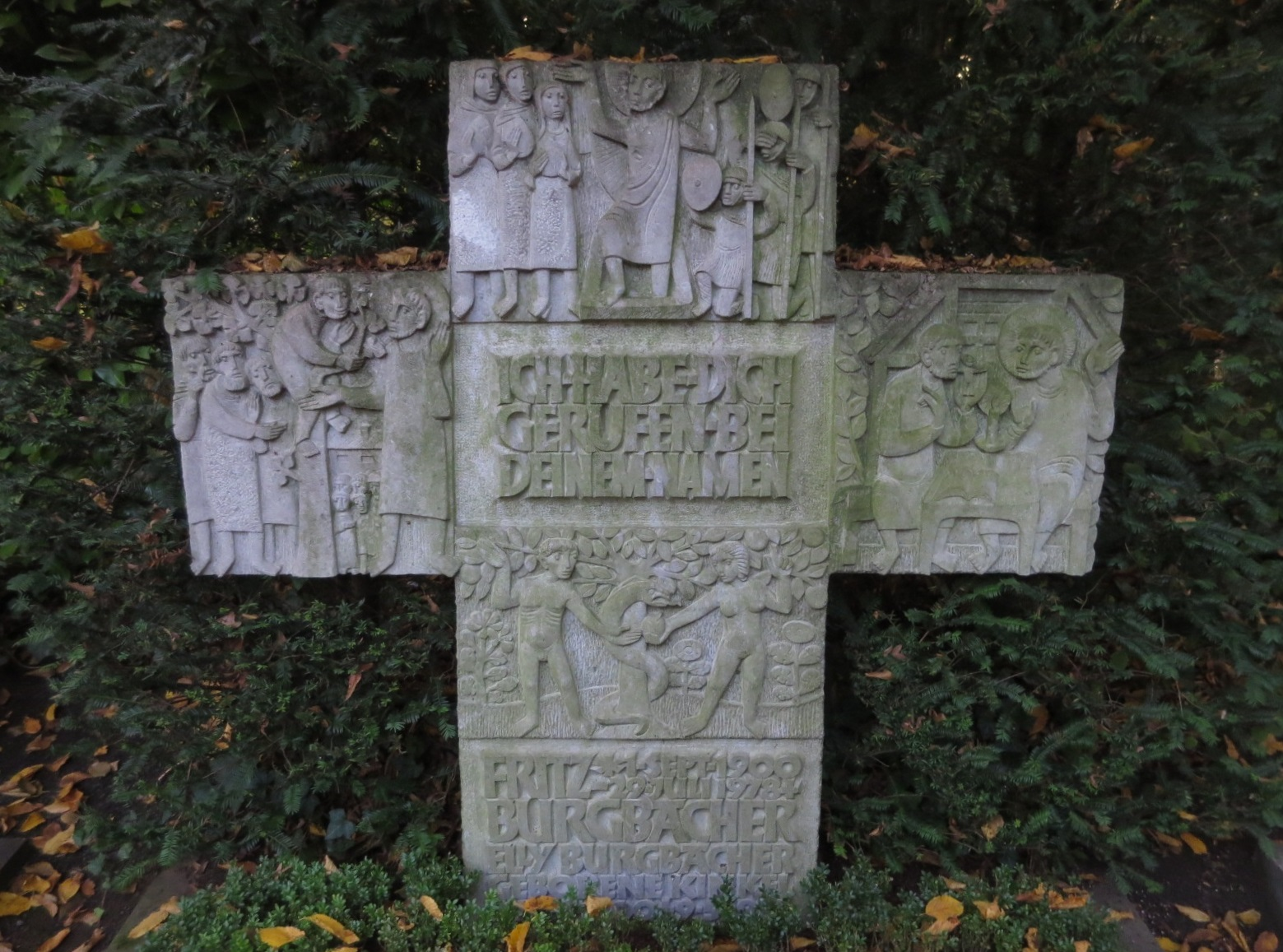 Fritz Burgbacher - Grab auf dem Kölner Friedhof Melaten